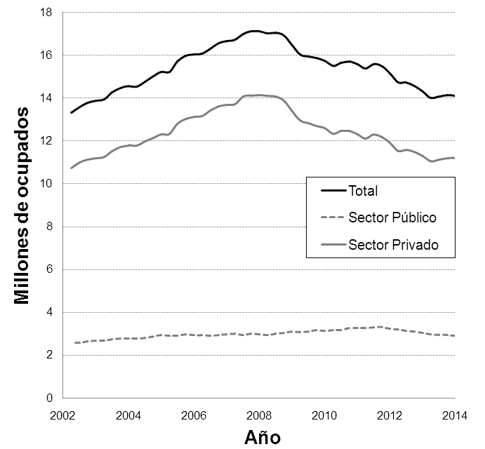 Evolución del número de empleados durante la crisis 2008-2012. Fuente: INE Poblacion activa